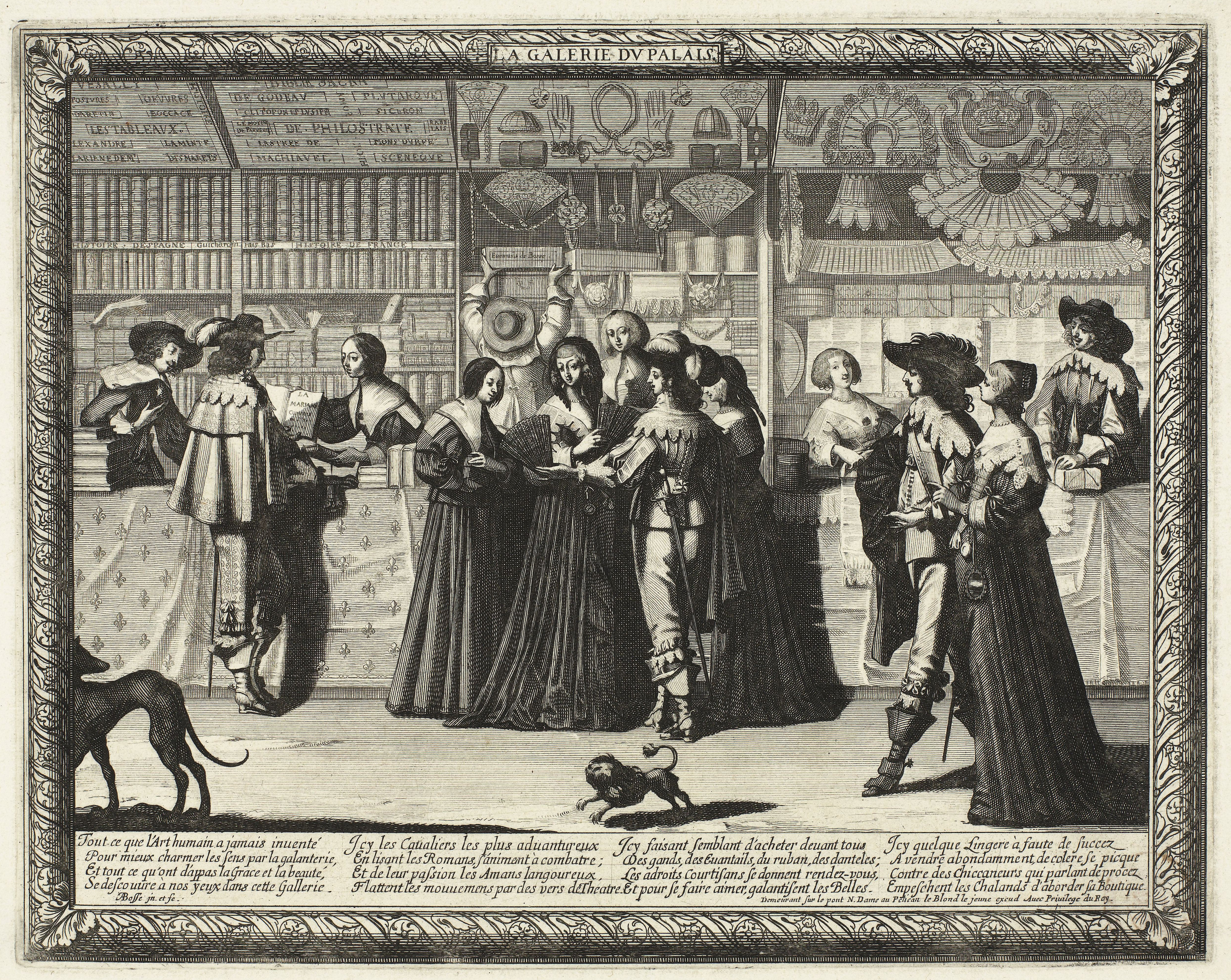 Tout ce que l'Art humain a jamais inventé / Pour mieux charmer les sens par la galanterie / Et tout ce qu'ont d'appas la Grace et la beauté, / Se descouvre à nos yeux dans cette Gallerie. // Icy les Cavaliers les plus advantureux / En lisant les Romans, s'animent à combatre; / Et de leur passion les Amans langoureux, / Flattant les mouvements par des vers de Theatre. // Icy faisant semblant d'acheter devant tous / Des gands, des Evantails, du ruban, des danteles; / Les adroits Courtisans se donnent rendez-vous, / Et pour se fair aimer, galantisent les Belles. // Icy quelque Lingere à faute de succez / A vendre abondamment de colere se picque / Contre des Chiccaneurs qui parlant de procez / Empeschent les Chalands d'aborder sa Boutique.’